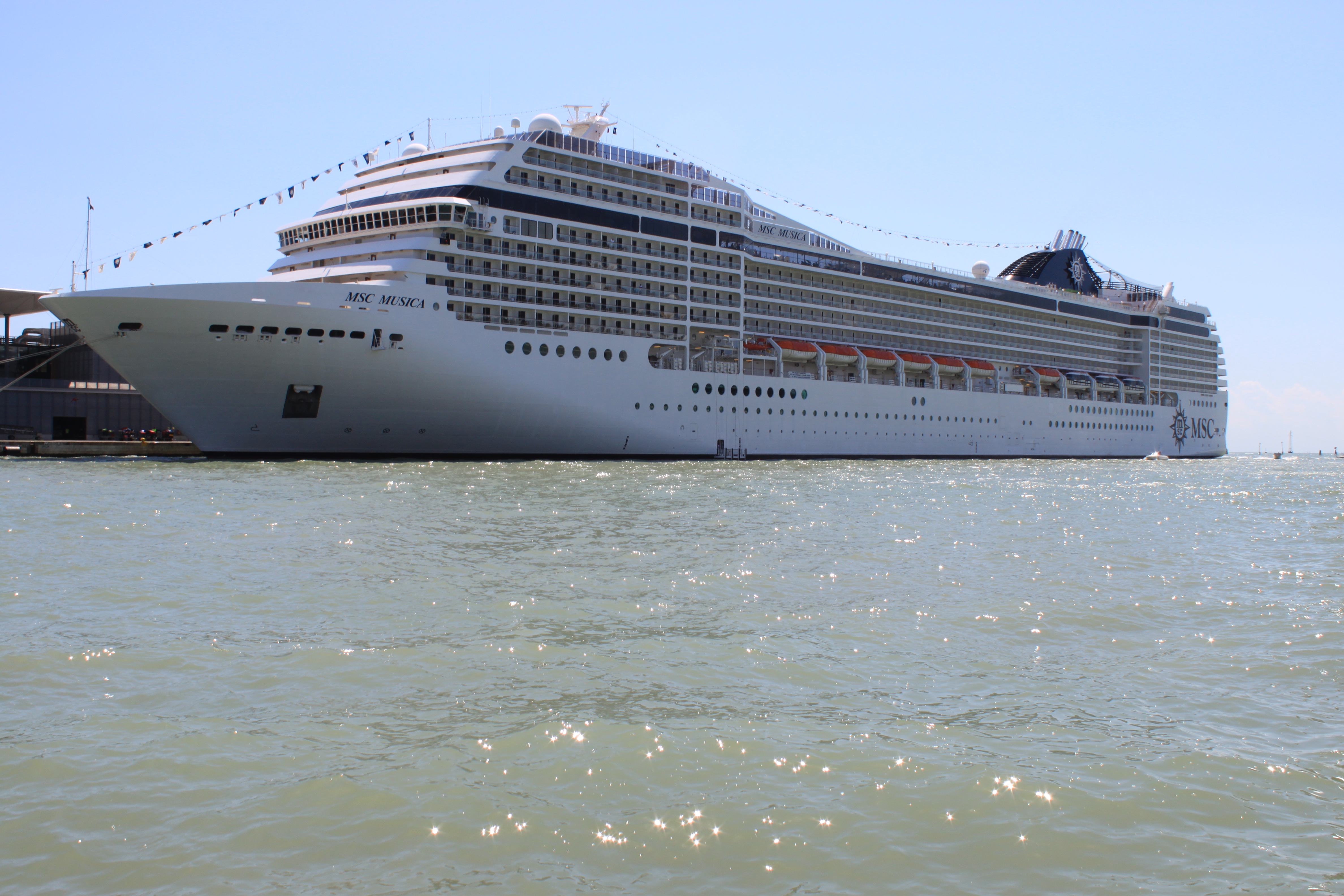 MSC Musica al porto di Venezia fotografata da Raffaele Thomann durante il mese di agosto 2010. MSC Musica è una delle navi appartenenti alla flotta della MSC Crociere.